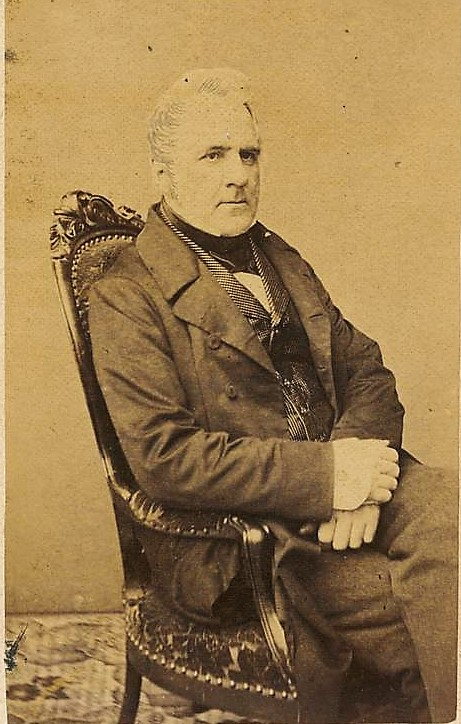 Porträt von Friedrich Schulthess, um 1850. Fotografie : Albuminabzug ; 9,3 x 5,3 cm. Zentralbibliothek Zürich, Schulthess, Friedrich (a) I, 2 unten.